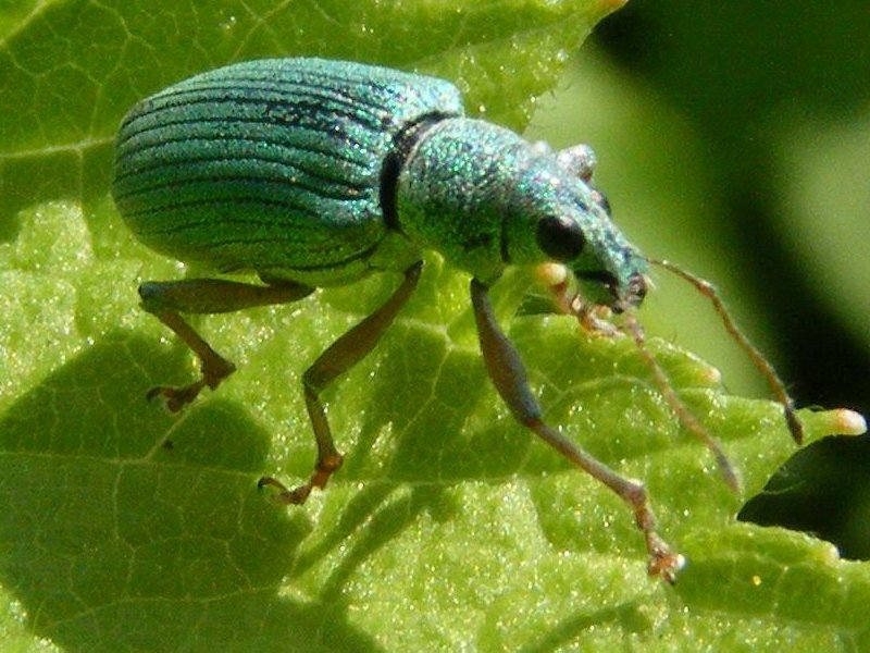 Charançon vert soyeux